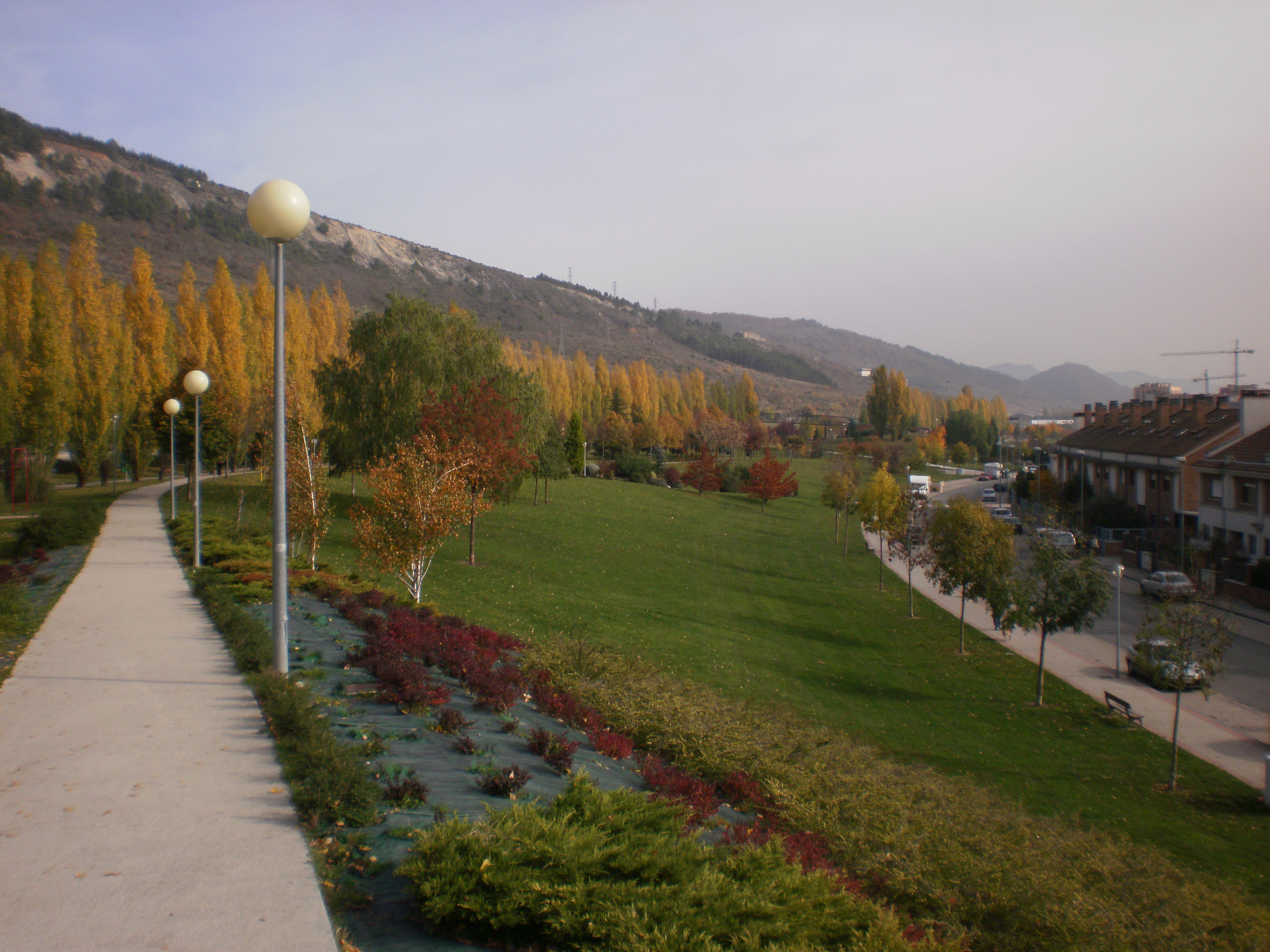 Zona Verde junto a la Ronda de Pamplona PA-30 en Ansoáin (Navarra-España)